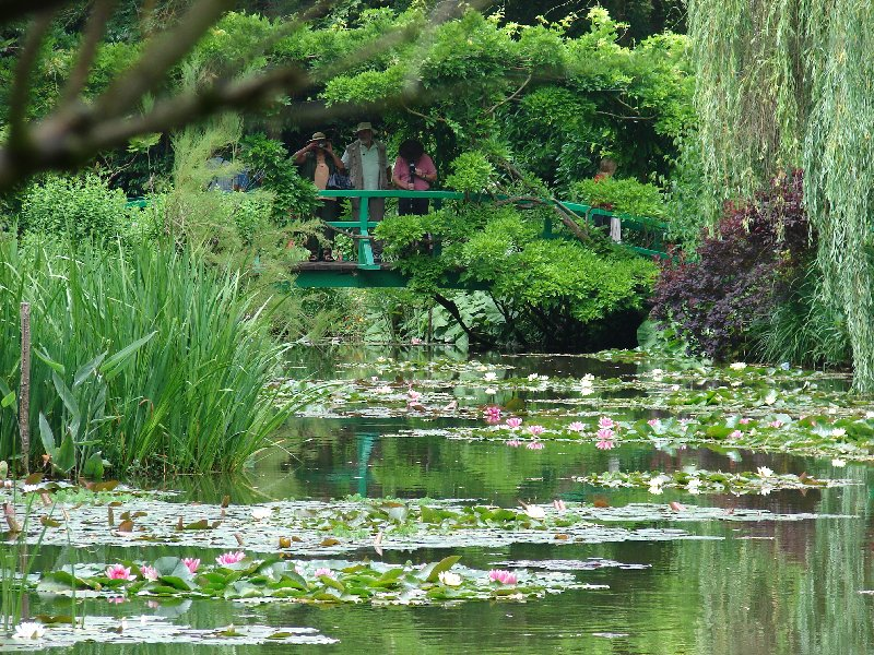 Jardins da Casa de Claude Monet em Giverny França. Ao fundo a famosa ponte japonesa. No lago, as Ninféias.